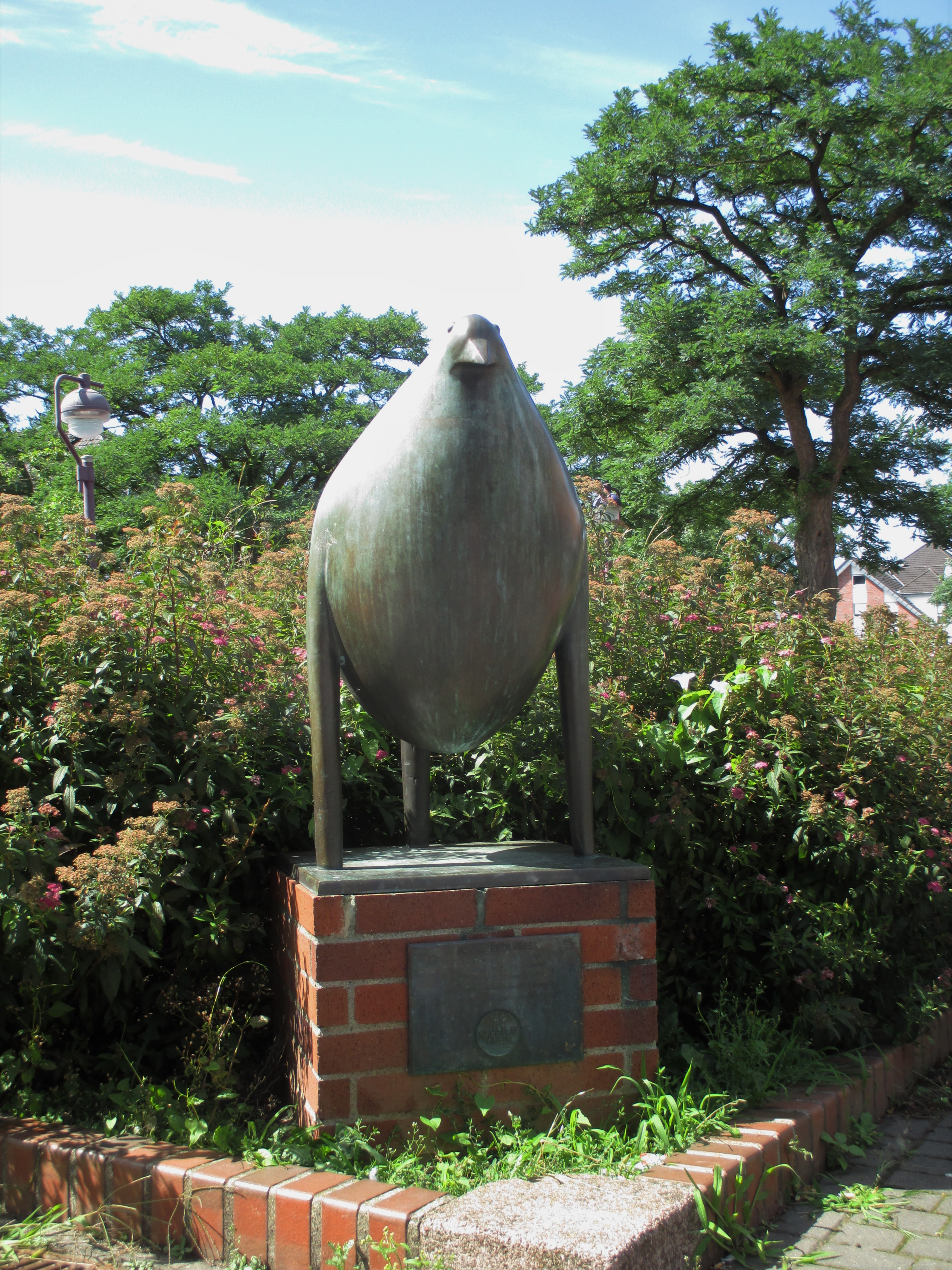 Der auch als "Fette Henne" bekannte Voerder Vogel von Gerhard Finke an der Bahnhofstraße. Kleinere Versionen weden als Dank an die Heimatvereine für ihre Arbeit vergeben. Der Vogel ist eines der Wappensymbole alter Geschlechter und Familien aus dem Voerder Gebiet.